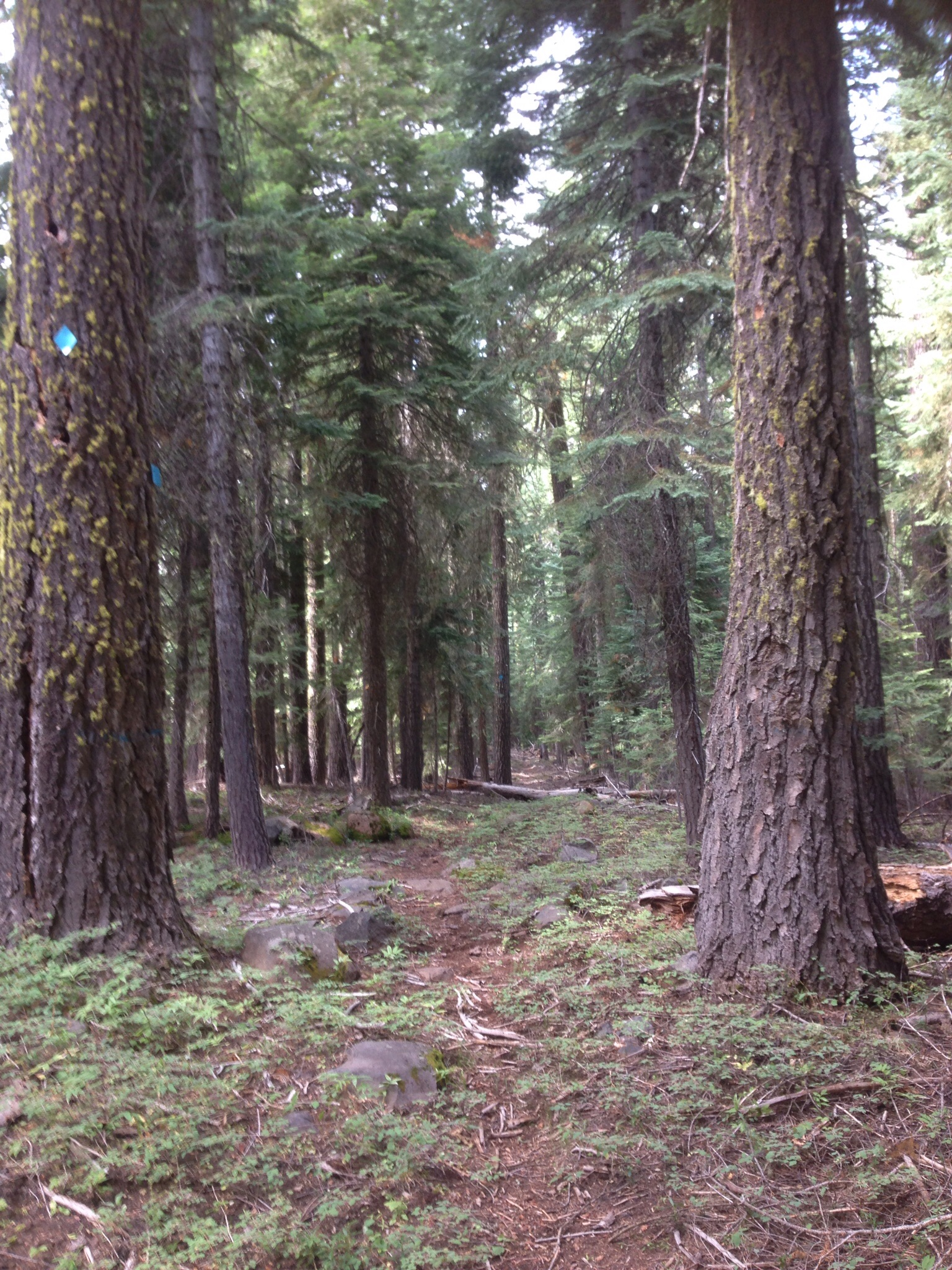 Trail Up to summit of Mt McLoughlin in Oregon Cascades